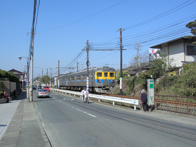 北熊本駅－亀井駅間の沿線風景 手前が北熊本駅方面、奥が御代志駅方面。